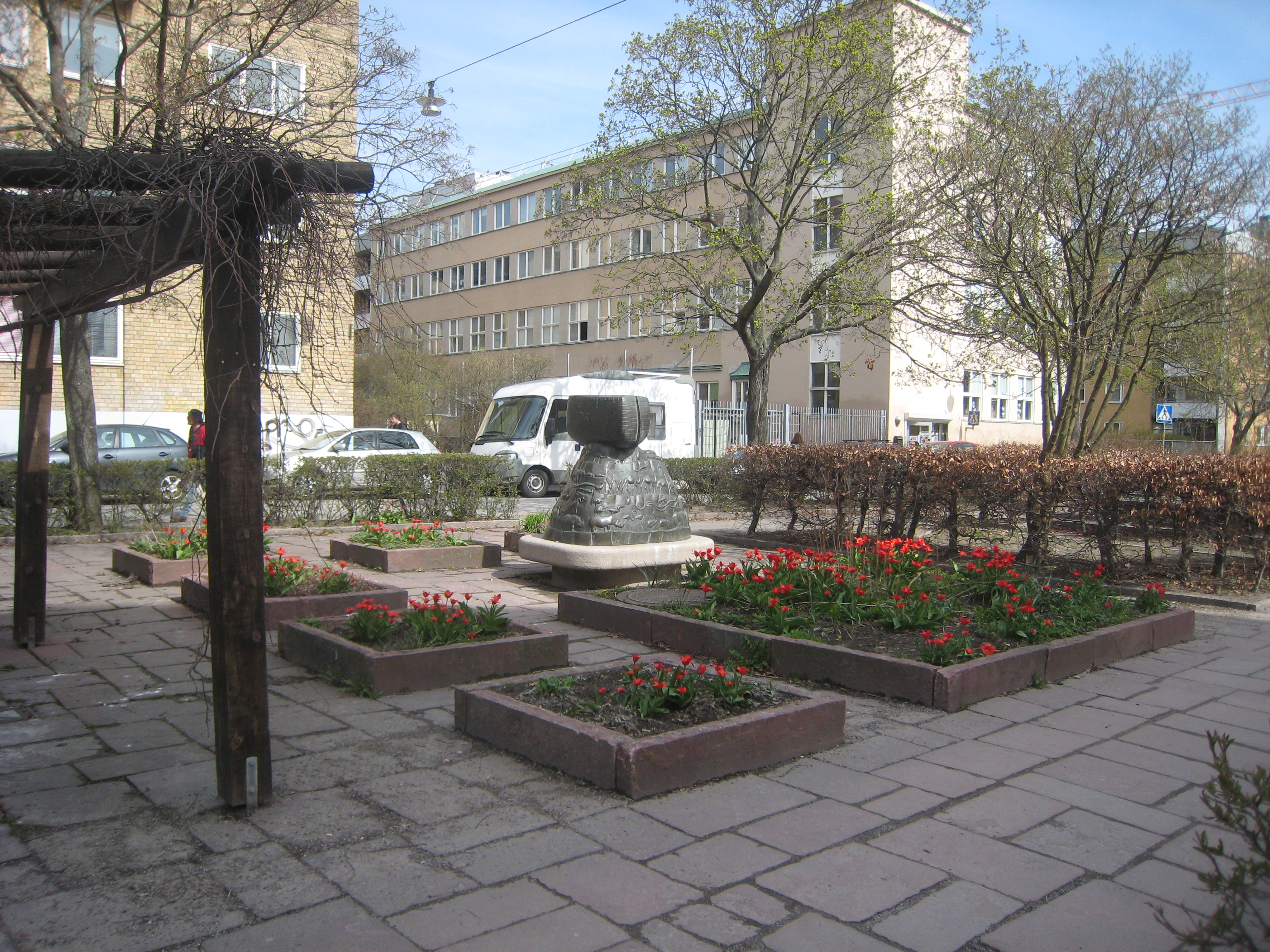 Gotlandsparken